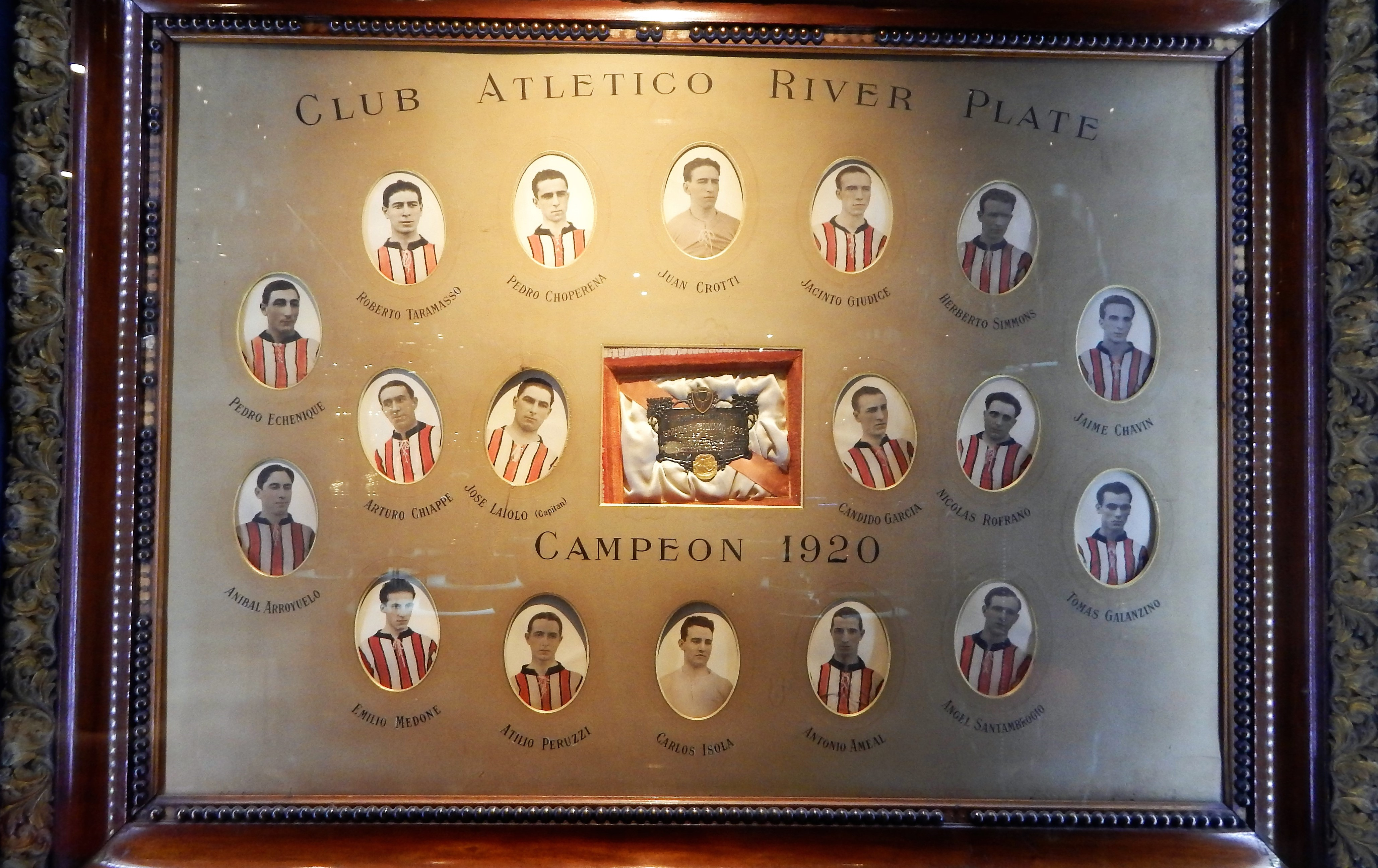 Cuadro del plantel del Club Atlético River Plate, campeón del Campeonato de Primera División 1920 (AAmF), exhibido en el Museo River Plate.